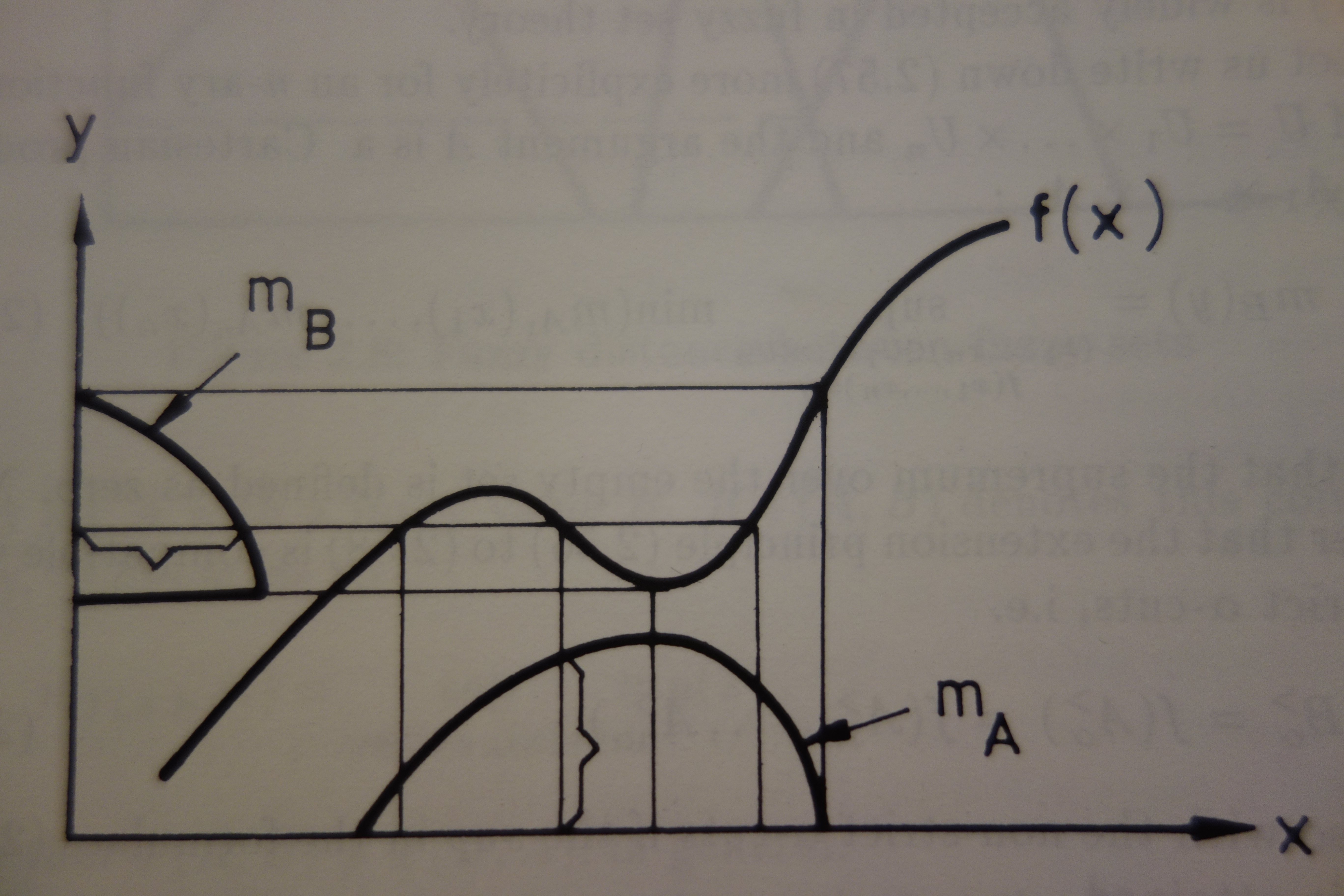 Zeigt, wie ein unscharfer Input mittels einer Funktion f in einen unscharfen Output überführt wird